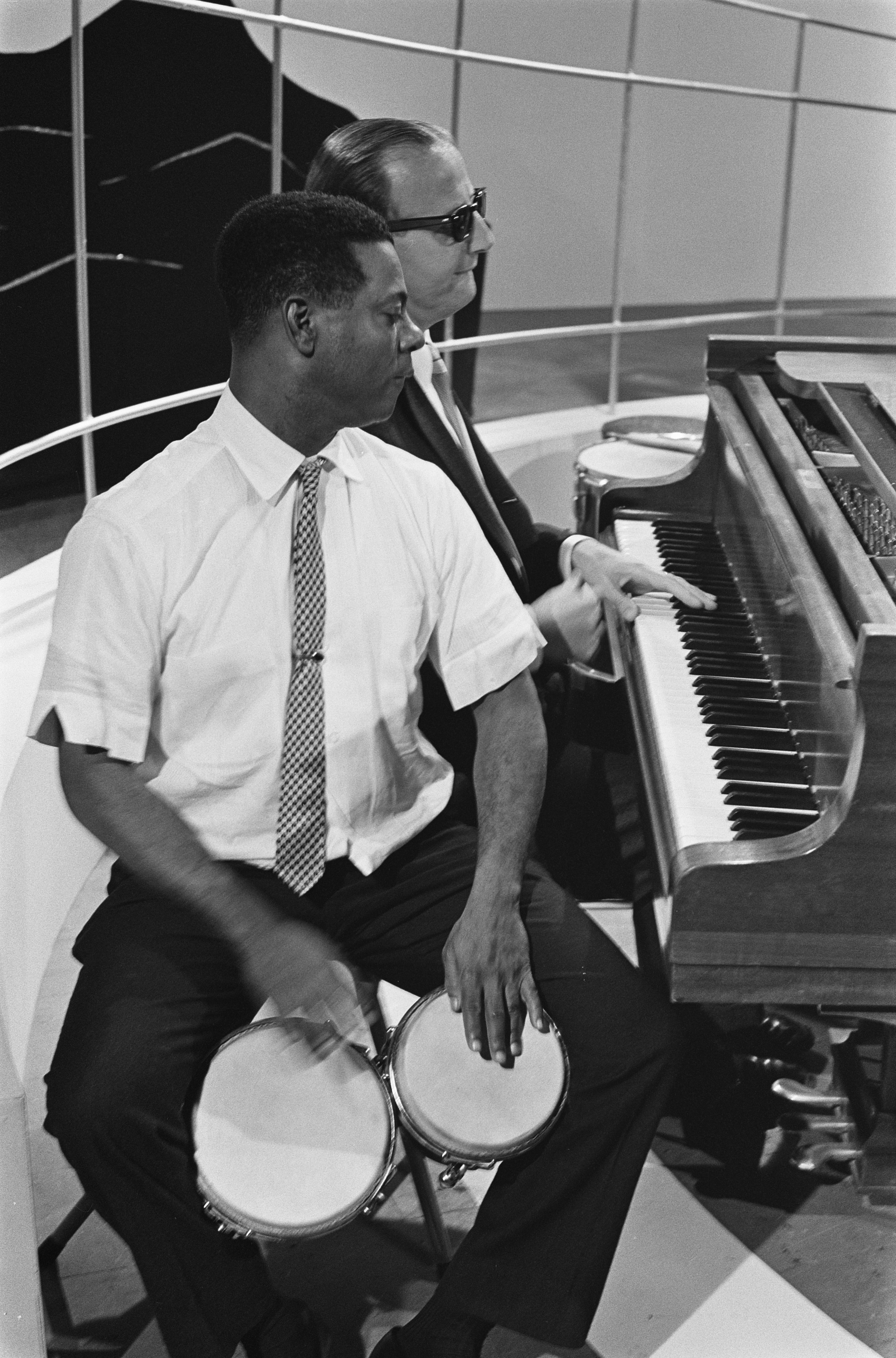 Collectie / Archief : Fotocollectie Anefo Reportage / Serie : [ onbekend ] Beschrijving : George Shearing Quintet in Holland, Hermando Peraza (bongospeler) en George Shearing tijdens de repetitie Datum : 23 september 1962 Trefwoorden : repetities Persoonsnaam : George Shearing, George Shearing Quintet Fotograaf : Gelderen, Hugo van / Anefo Auteursrechthebbende : Nationaal Archief Materiaalsoort : Negatief (zwart/wit) Nummer archiefinventaris : bekijk toegang 2.24.01.05 Bestanddeelnummer : 914-3364